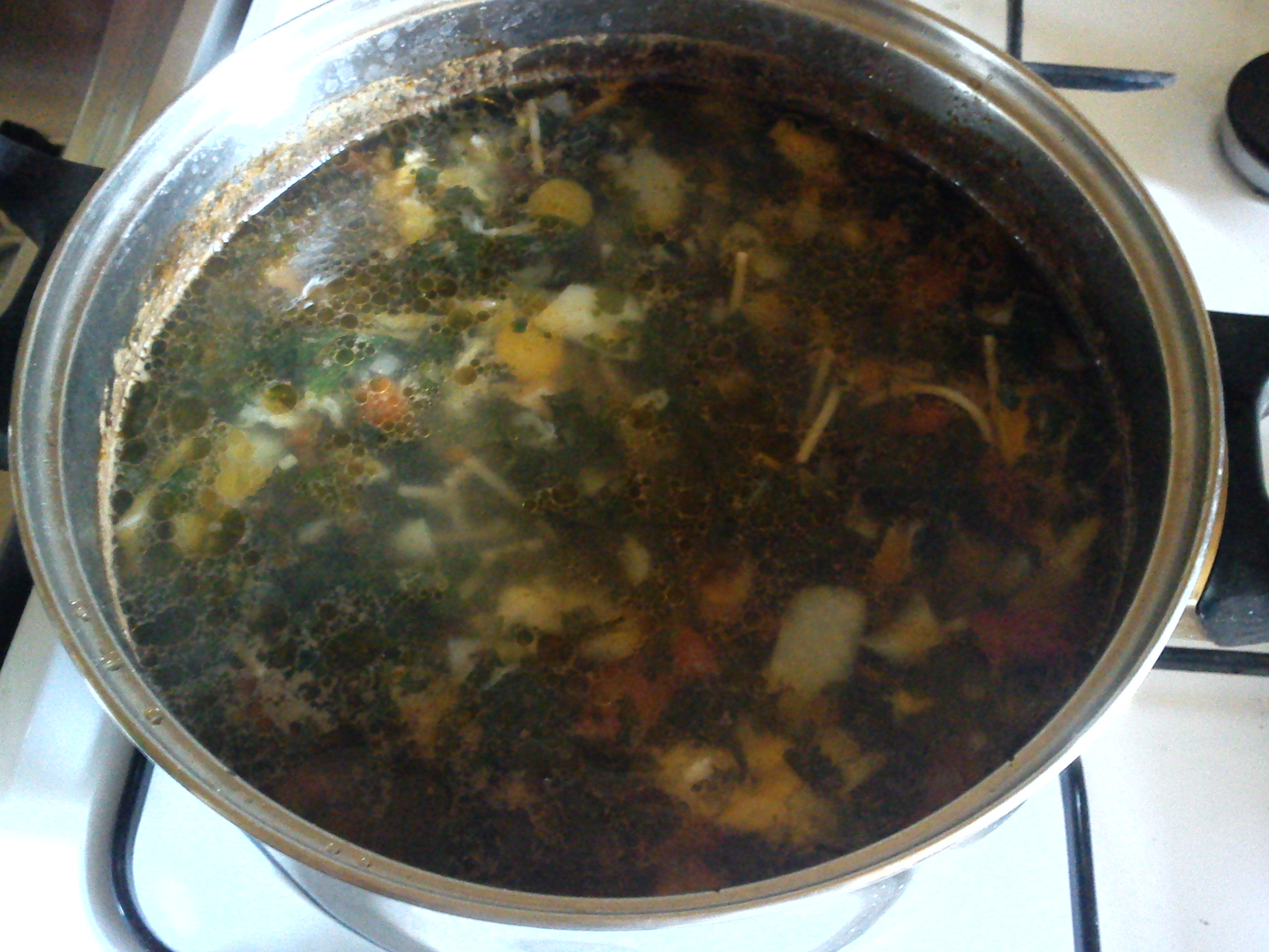 wygląd pokrzywniaka